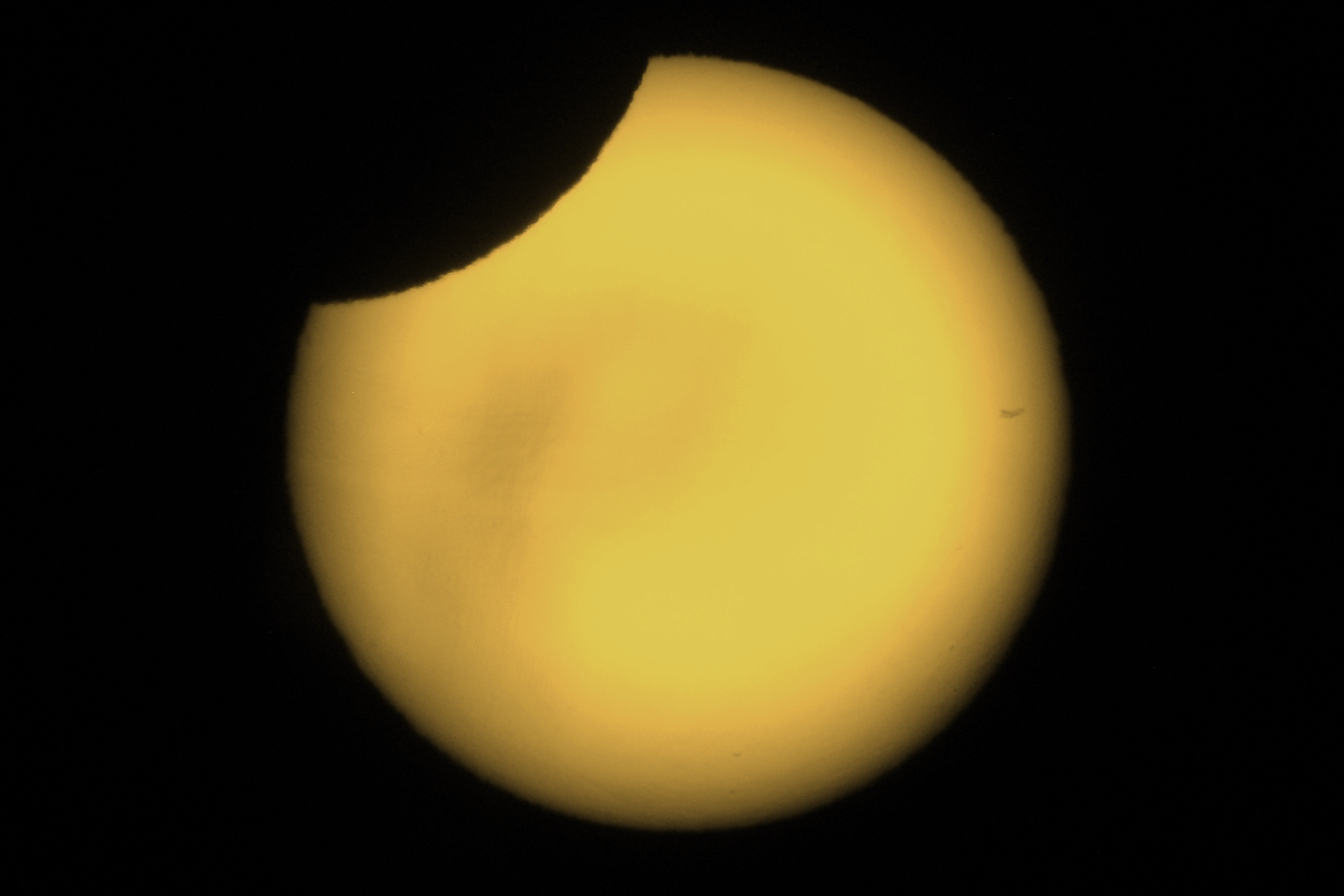 ECLIPSE SOLAR PARCIAL DEL 15.02.2018. Desde Olivos, Gran Buenos Aires y a las 19:12 hs. (hora local), justo en el Eclipse Medio o Máximo del lugar. El Sol eclipsado o cubierto por la Luna un 17%. Imagen obtenida con telescopio reflector (10 cms.) y cámara digital adaptada. Poco nítida debido a una alta nubosidad (cirros). La he tratado con MS-Office Picture Manager. Altura del Sol: 6°15'. Azimut: 79° 05'. SOL y LUNA en CAPRICORNIUS.